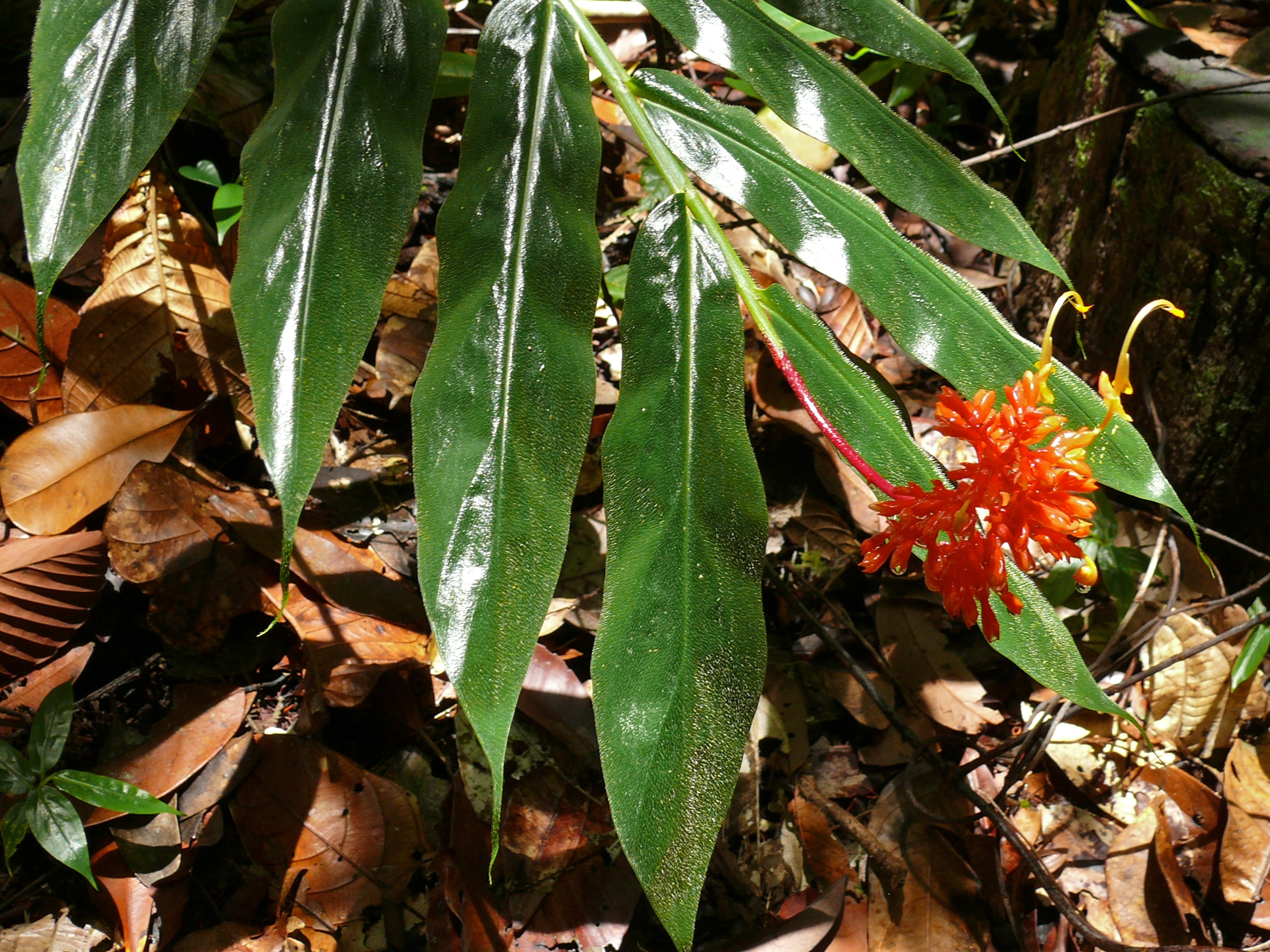 Similajau NP, Sarawak, MALAYSIA